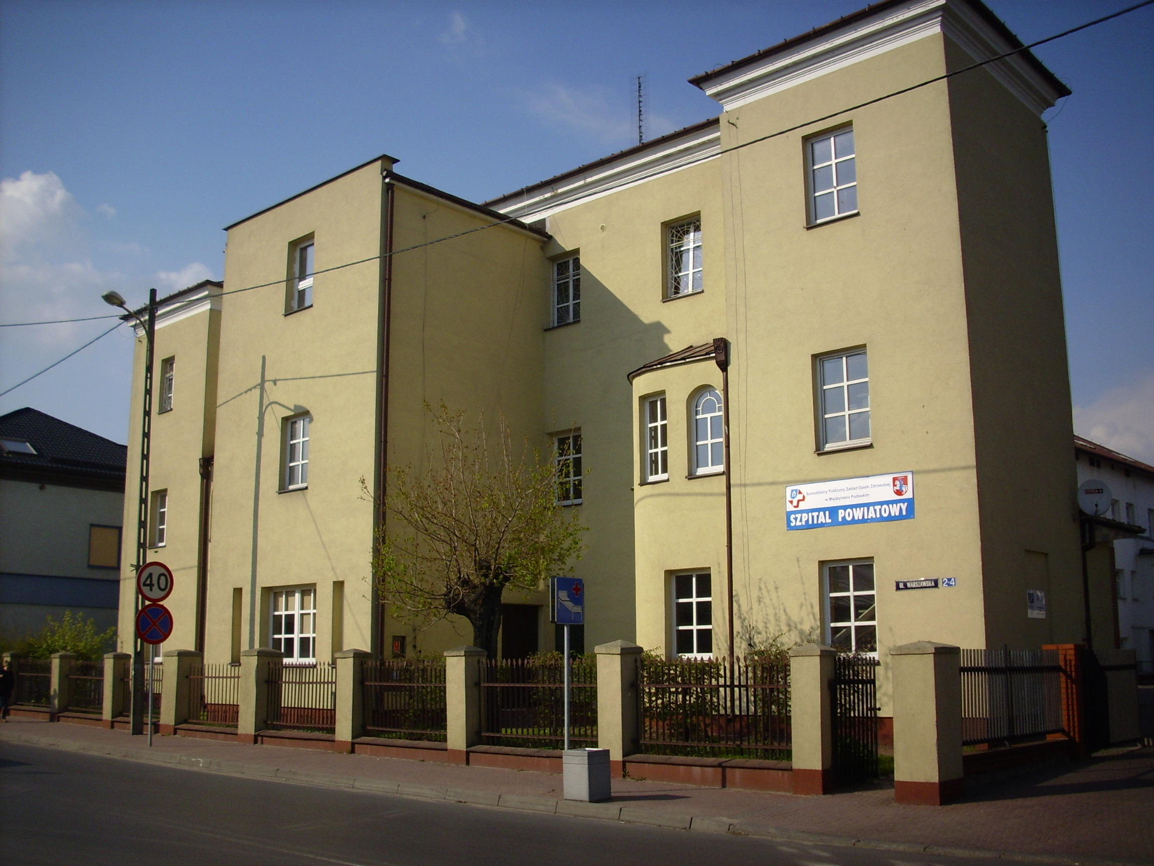 Szpital w Międzyrzecu Podlaskim.